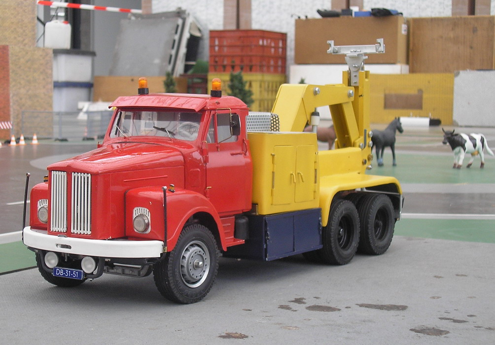 Voorbeeld van een RC modeltruck in de schaal 1:16 geheel handgemaakt